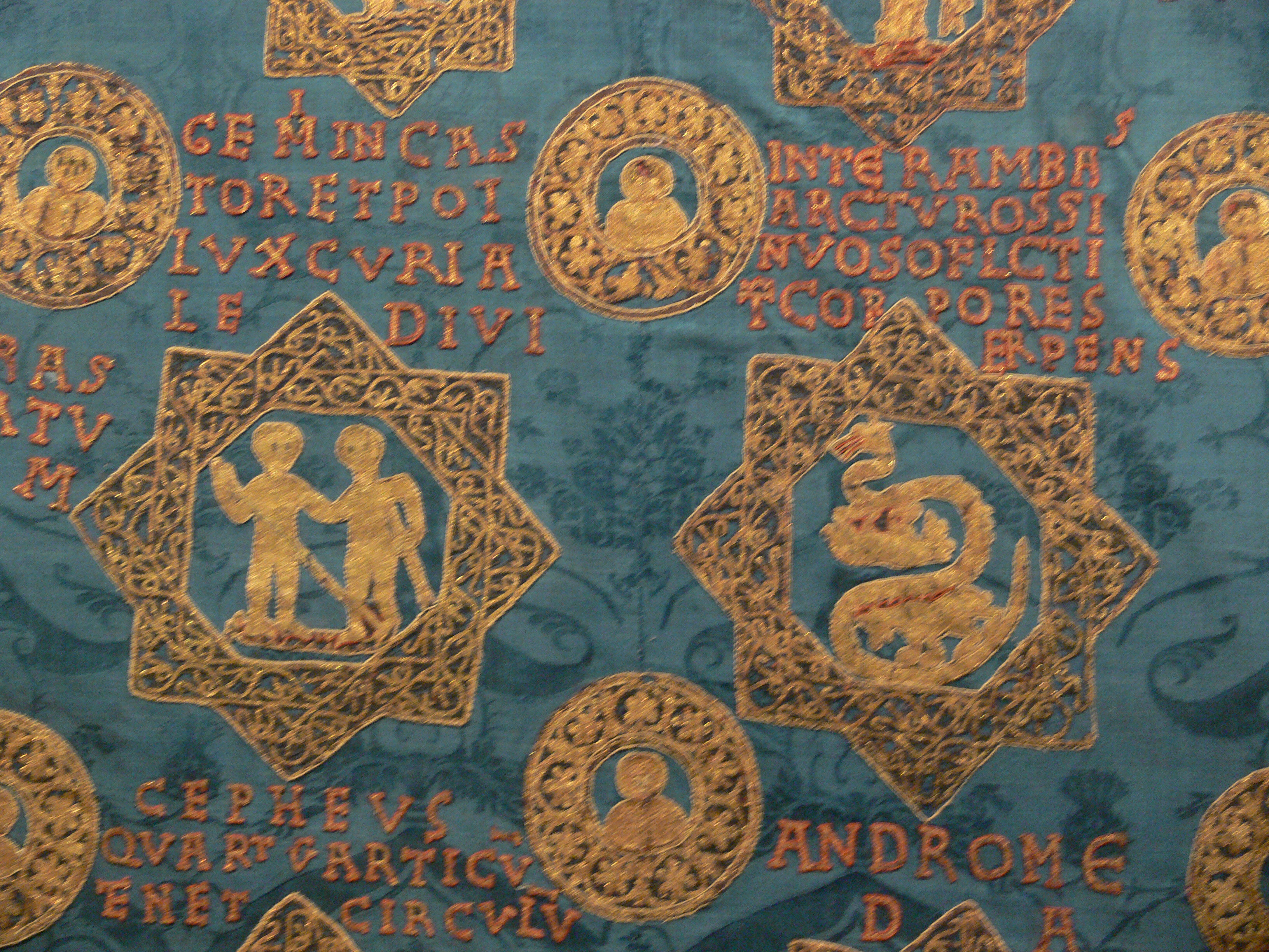 Sternenmantel Kaiser Heinrichs II. Stickereien: Regensburg, um 1018–1024, Trägerstoff: Italien, um 1453. Diözesanmuseum Bamberg (2728/3–6)